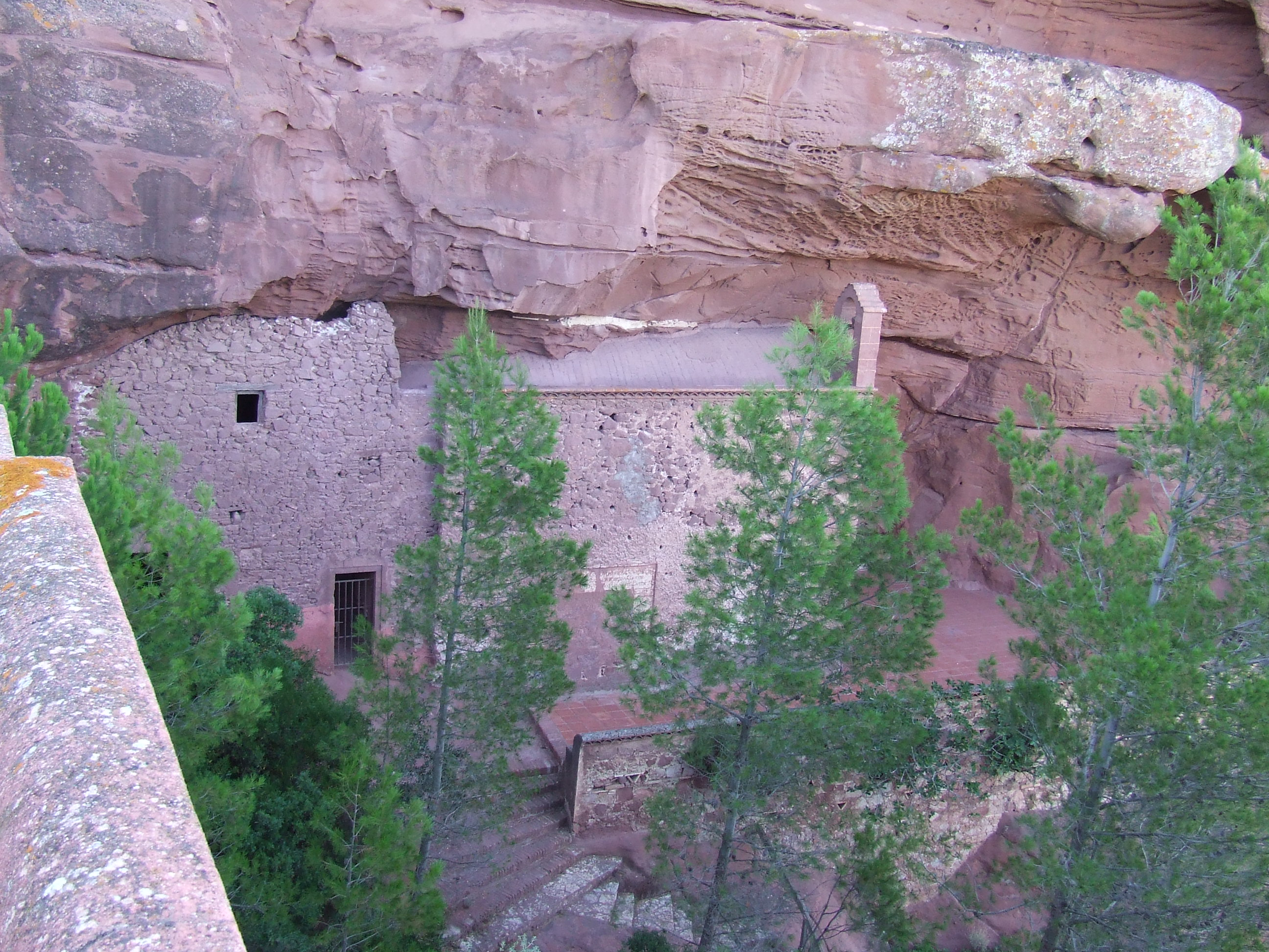 Ermita troglodítica de Sant Gregori, al terme de Falset.